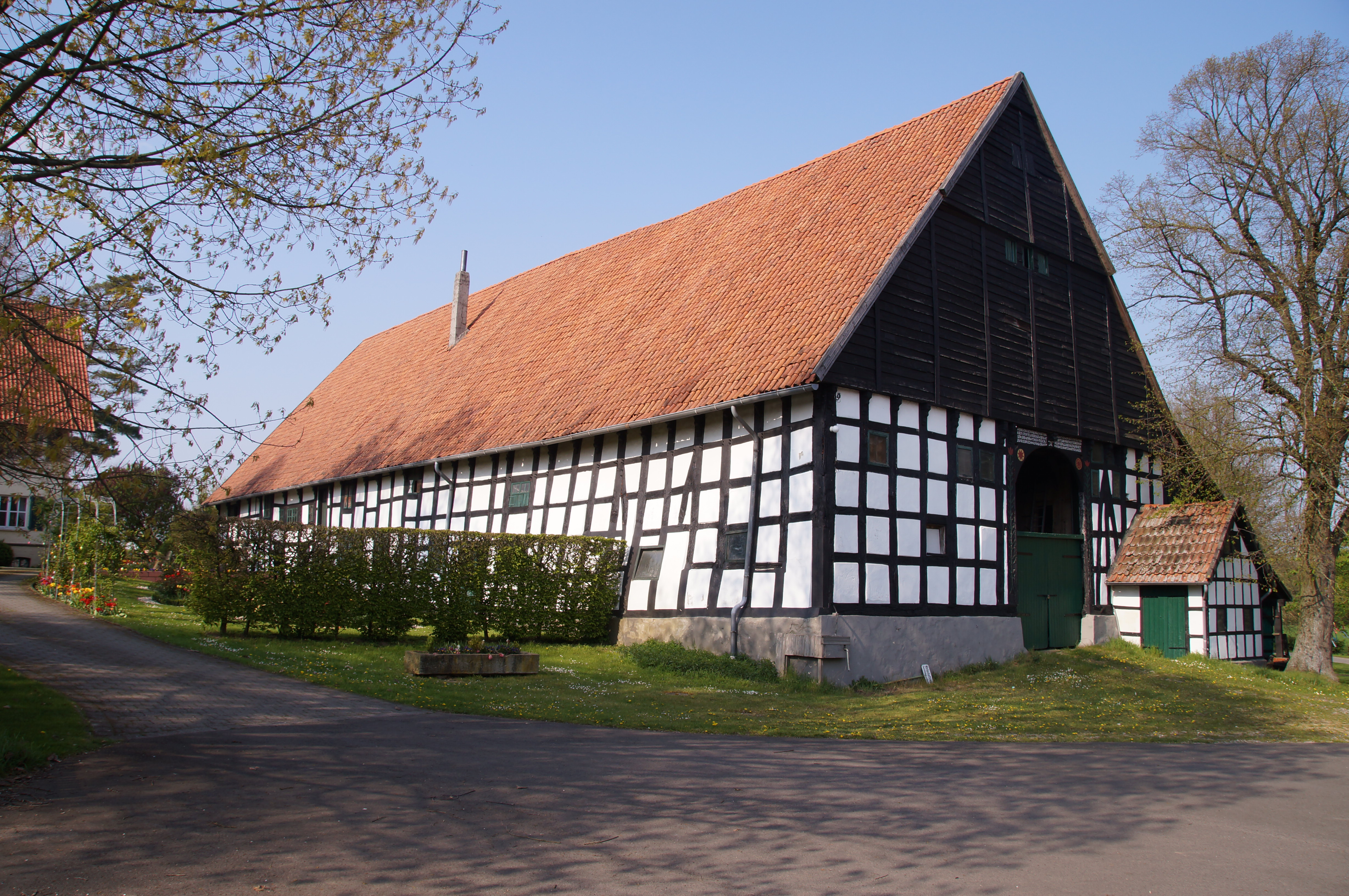 Hof Ermgassen in Leopoldshöhe, Germany This is a photograph of an architectural monument.